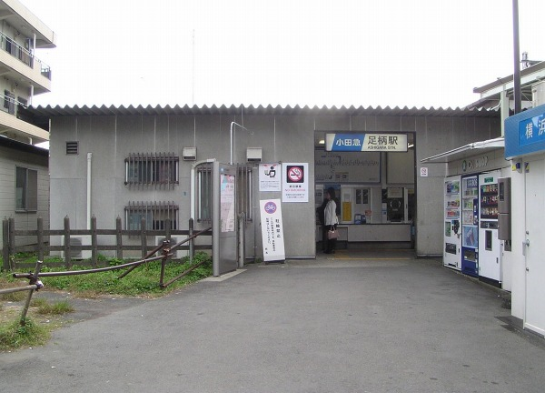 足柄駅 (神奈川県) 2006年10月28日、投稿者が撮影。